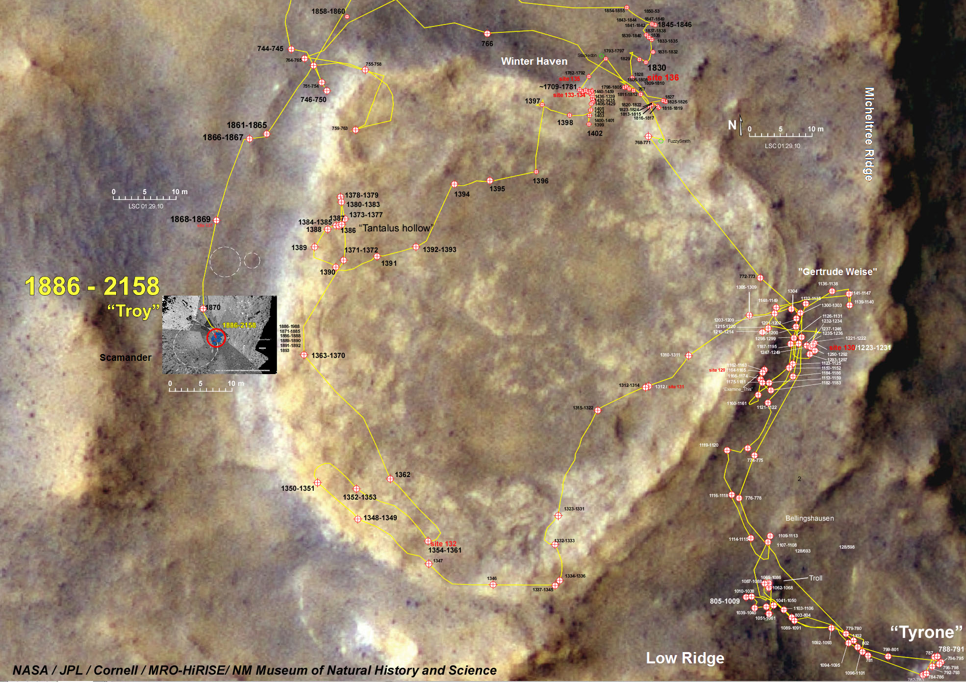 Detailaufnahme Home Plate mit Fahrweg Spirit